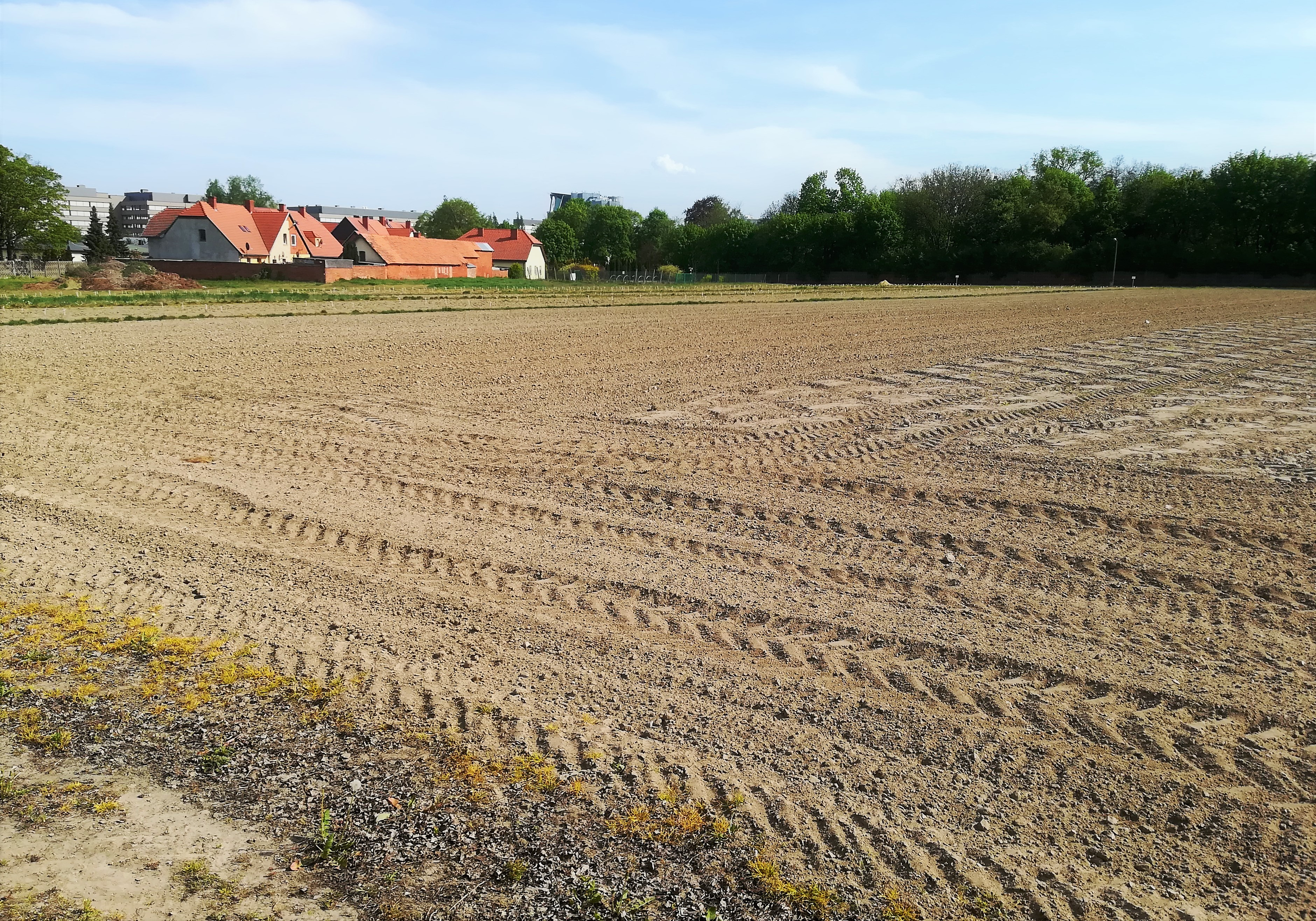 Pola szparagowe w Poznaniu na Marcelinie. Bank genów szparaga w Poznaniu Katedry Warzywnictwa Uniwersytetu Przyrodniczego w Poznaniu.